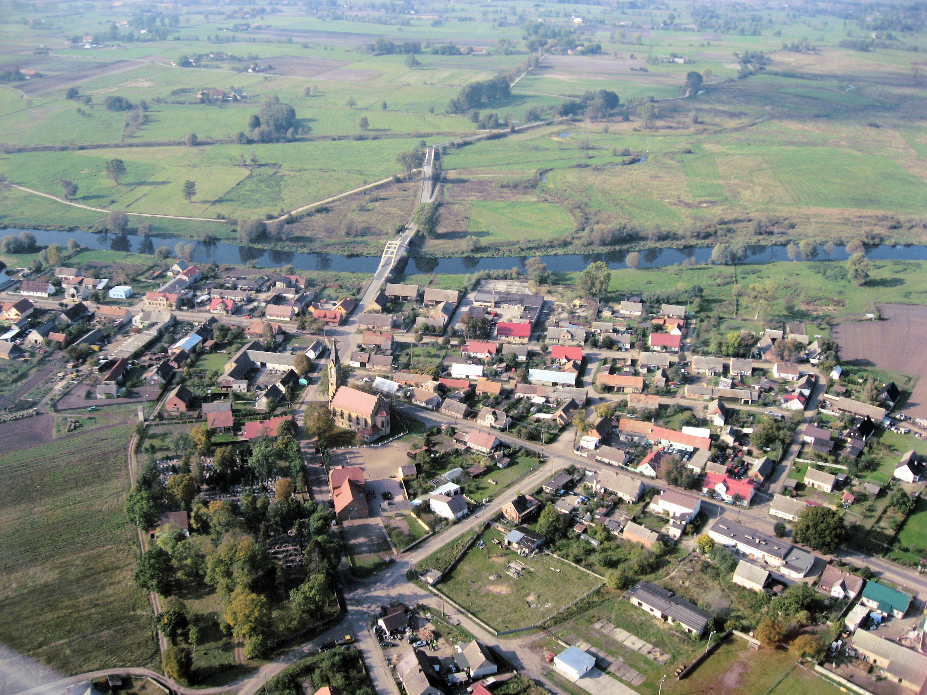 Trzebicz, gmina Drezdenko, powiat strzelecko-drezdenecki, Poland